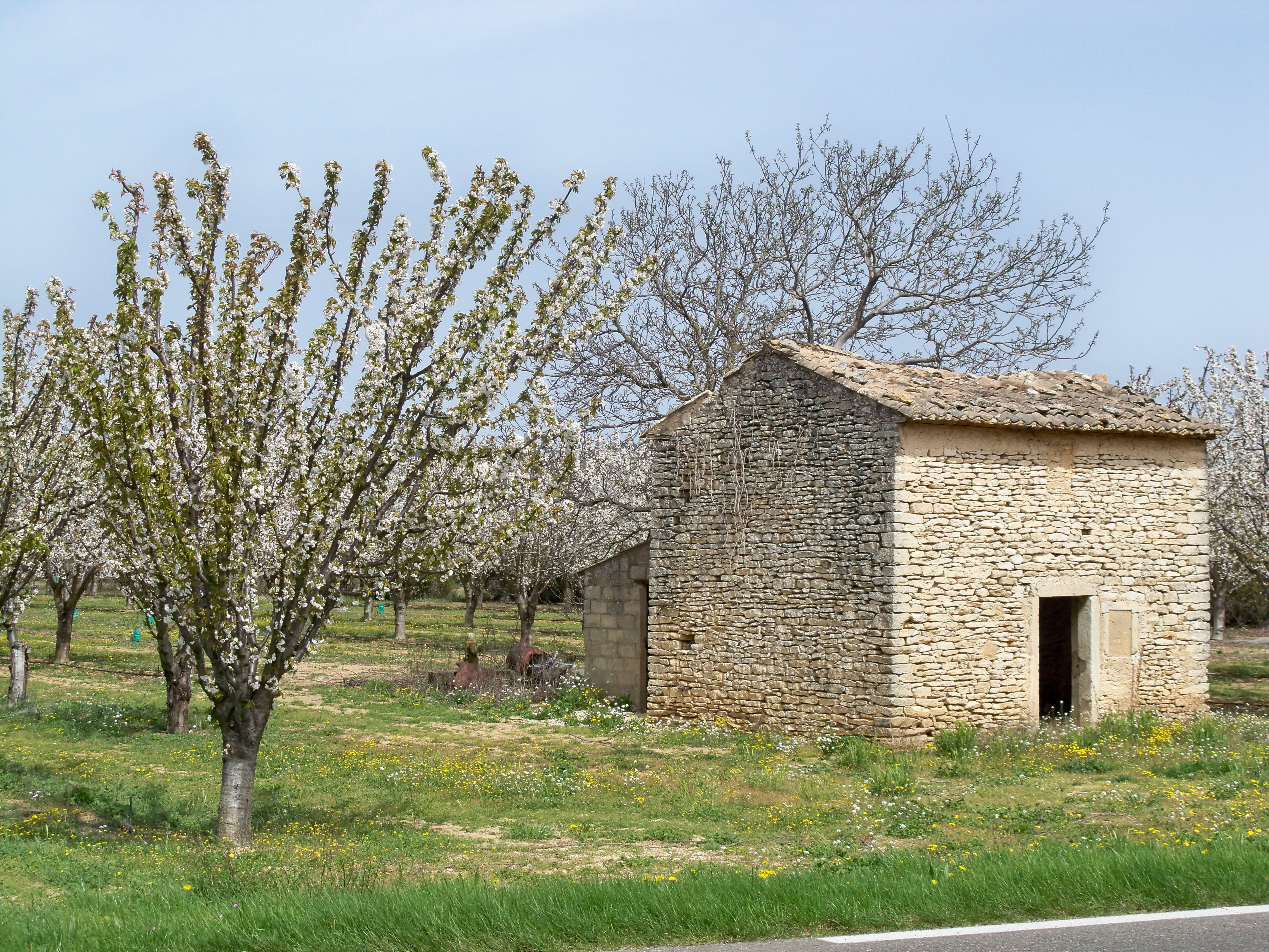 Cerisiers et cabanon près de Coustellet, Vaucluse, France